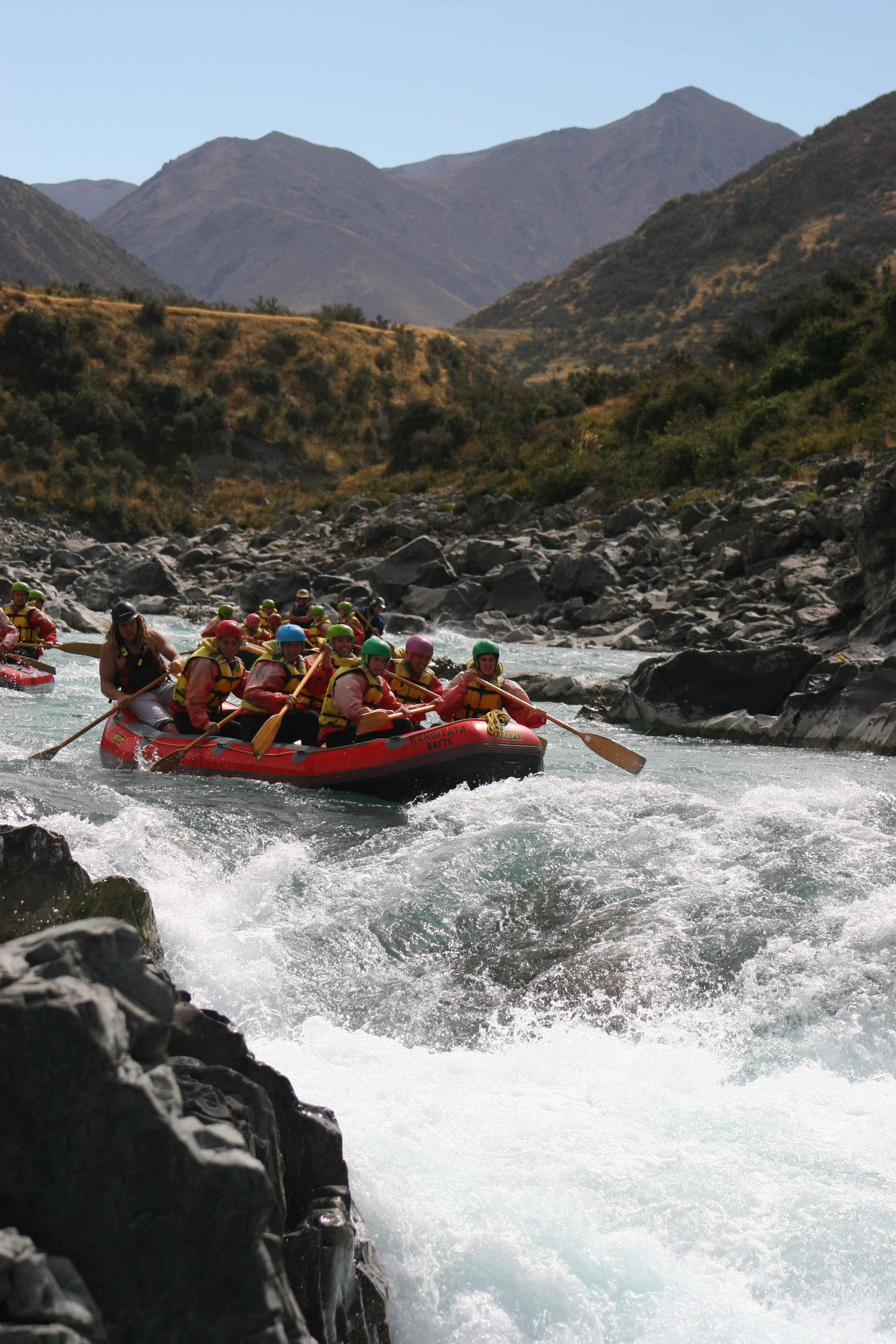 Rangitata River Rafting 11